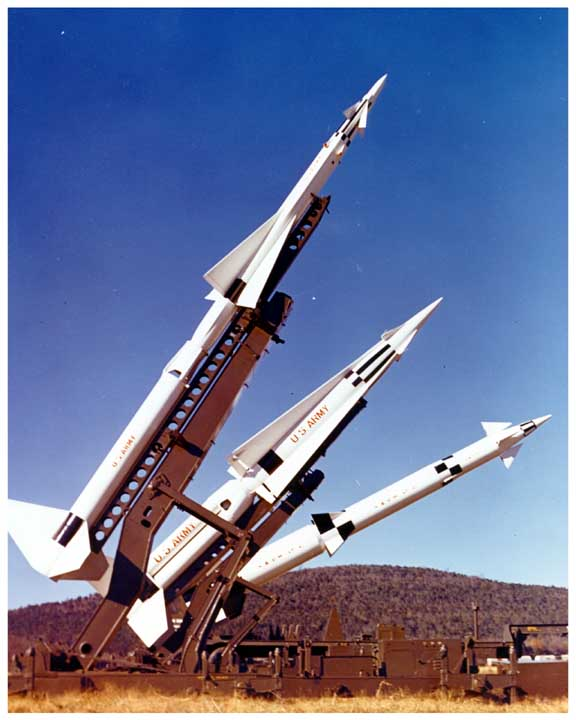 Nike family, From left, MIM-3 Nike-Ajax, MIM-14 Nike-Hercules, LIM-49 Nike-Zeus.